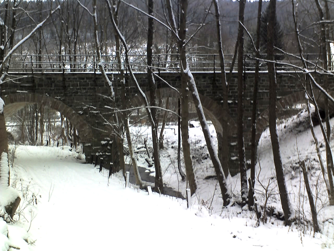 Grenzbrücke zwischen Thüringen und Bayern bei Blankenstein in Blechschmidtenhammer. Ehemals verlief über diese Brücke die Bahngleise der Bahnstrecke Triptis-Marxgrün. Jedoch wurde bei der Trennung Deutschlands die Bahnstrecke genau in der Mitte dieser Brücke unterbrochen. Der darunter fließende Bach "Moschwitz" bildet die Grenze zwischen Thüringen und Bayern. Später die Selbitz und die Saale.